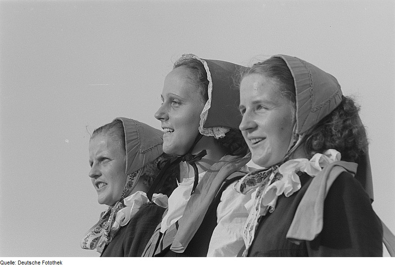 Original image description from the Deutsche Fotothek Mädchengruppe in Trachten